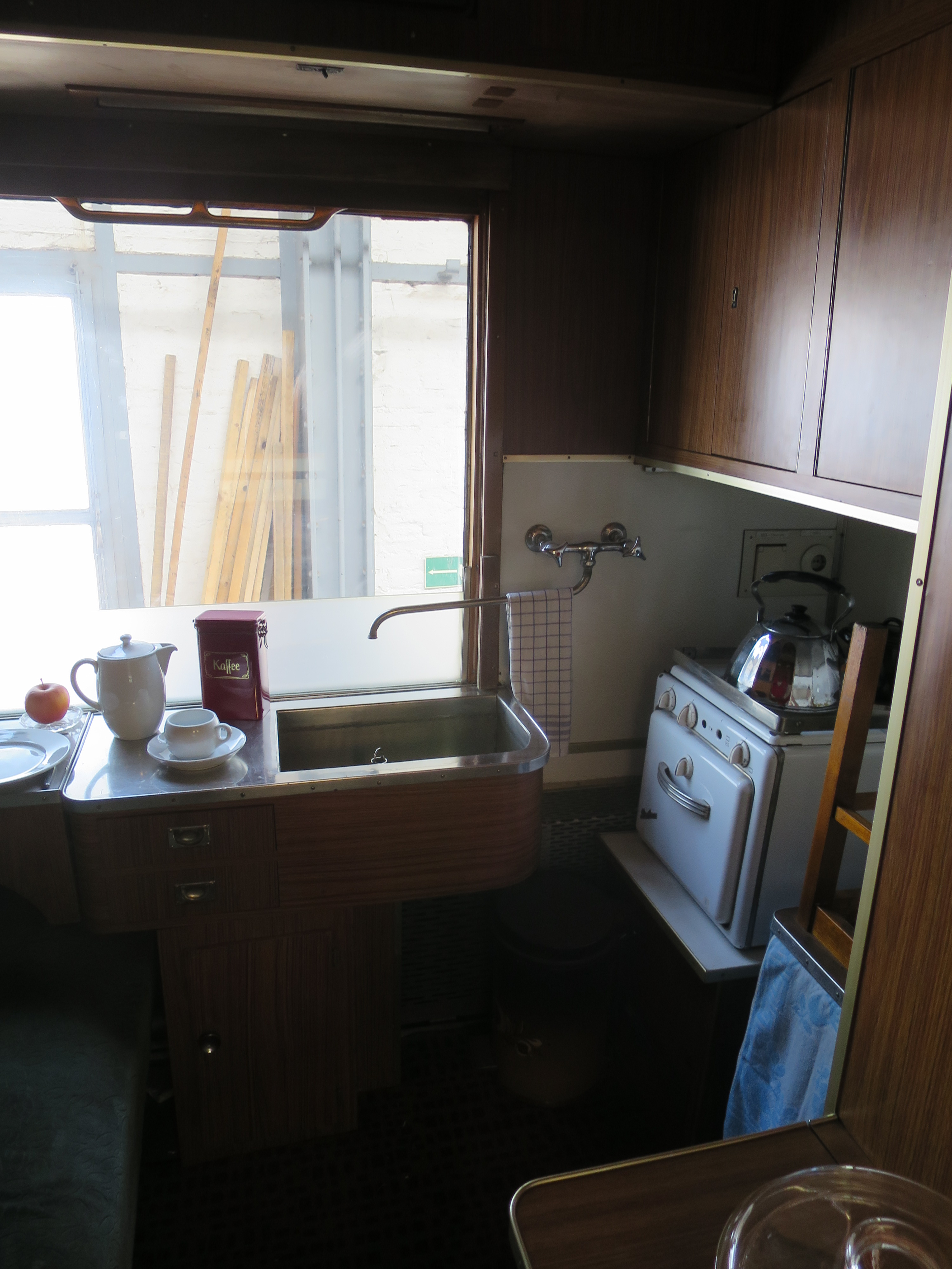 Salonwagen v. Joseph Goebbels, später der des Bundesverkehrsministers